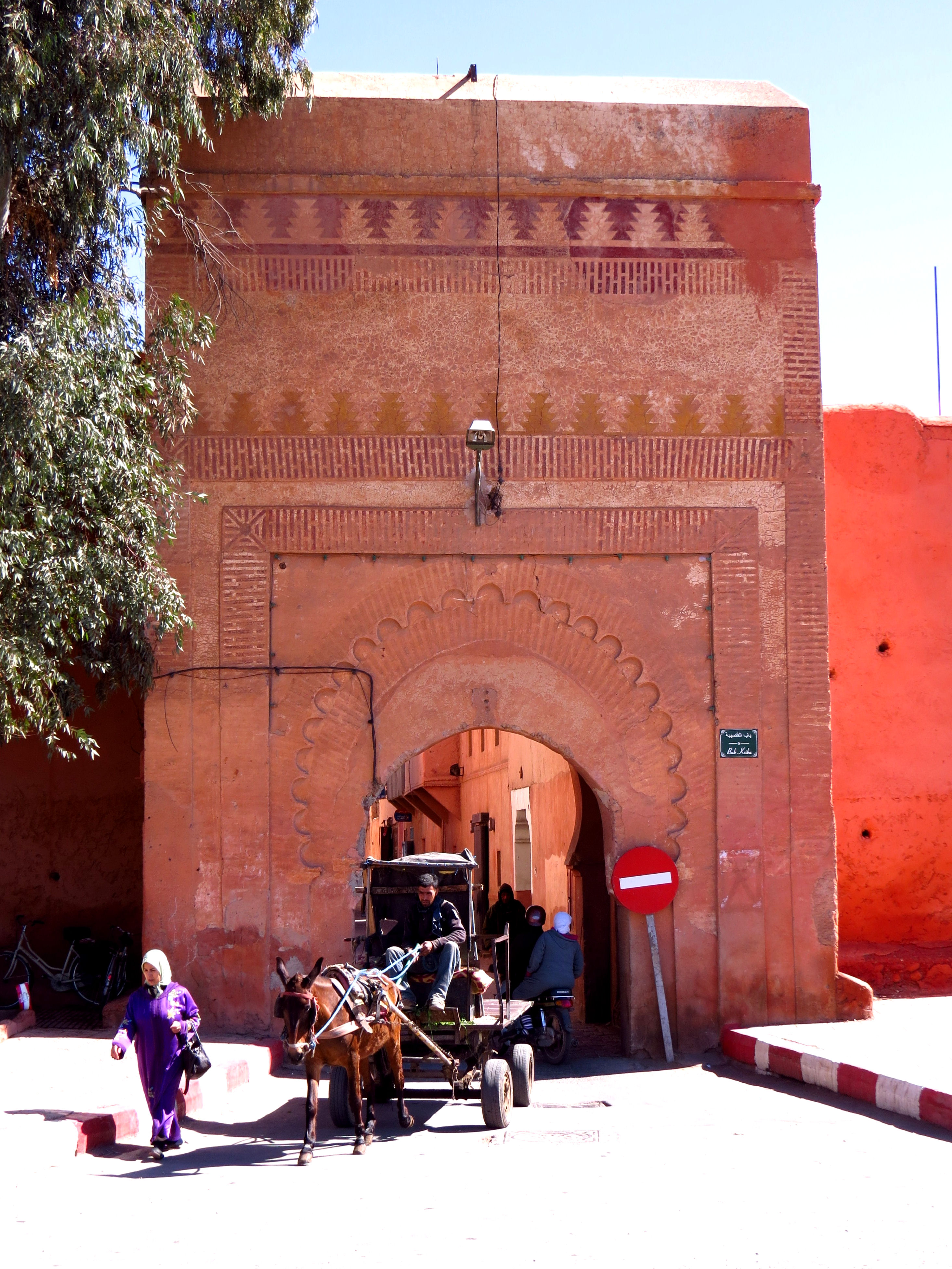 Bab Ksiba (Ksiba Gate), Marrakech, Morocco